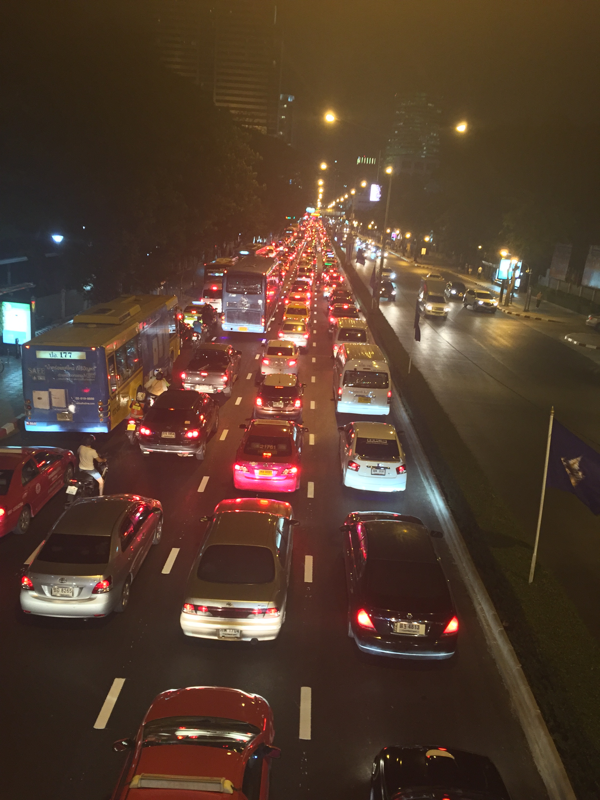 ถนนพญาไทถ่ายในช่วงพลบค่ำ ด้านหน้าโรงเรียนเตรียมอุดมศึกษา